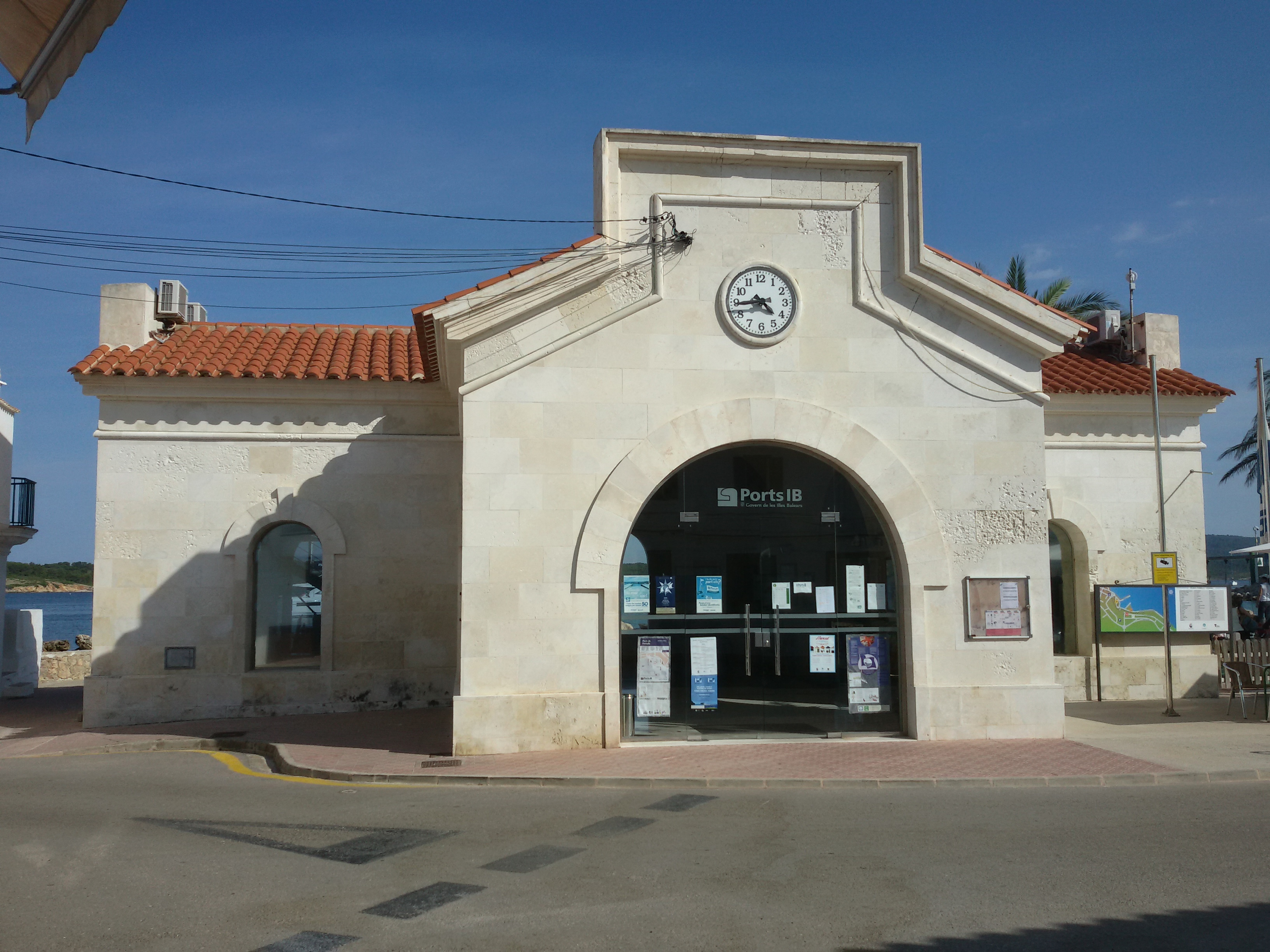 Casa del Contramaestre (Fornells)